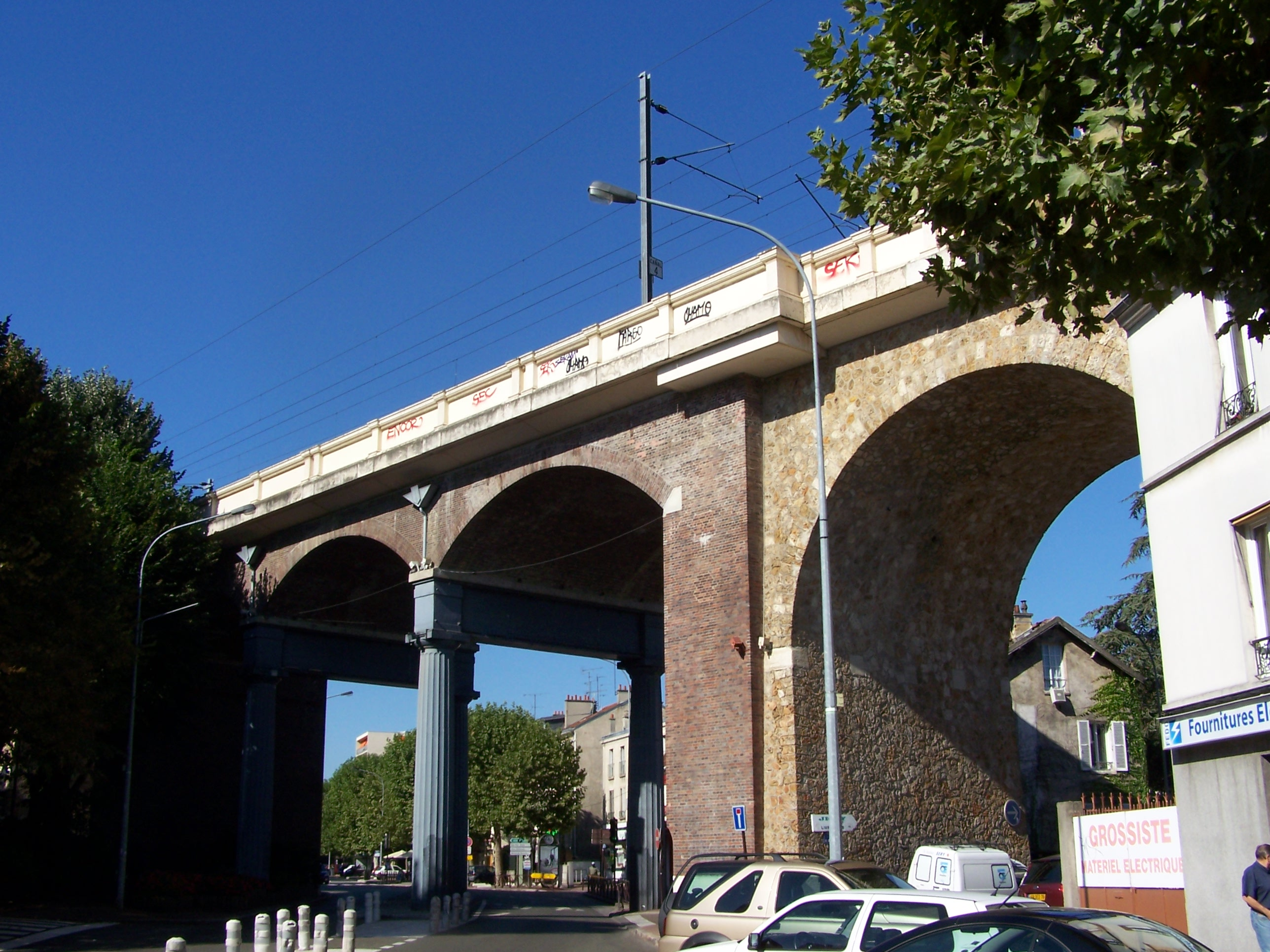 Arcades de Viroflay (Yvelines, France)